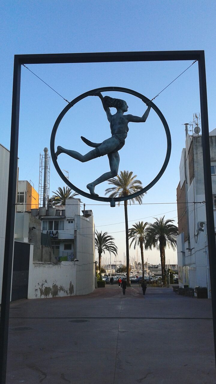 Escultura de Oscar Estruga i Andreu, en la plaza Mediterrània de Vilanova i la Geltrú. Visión frontal.